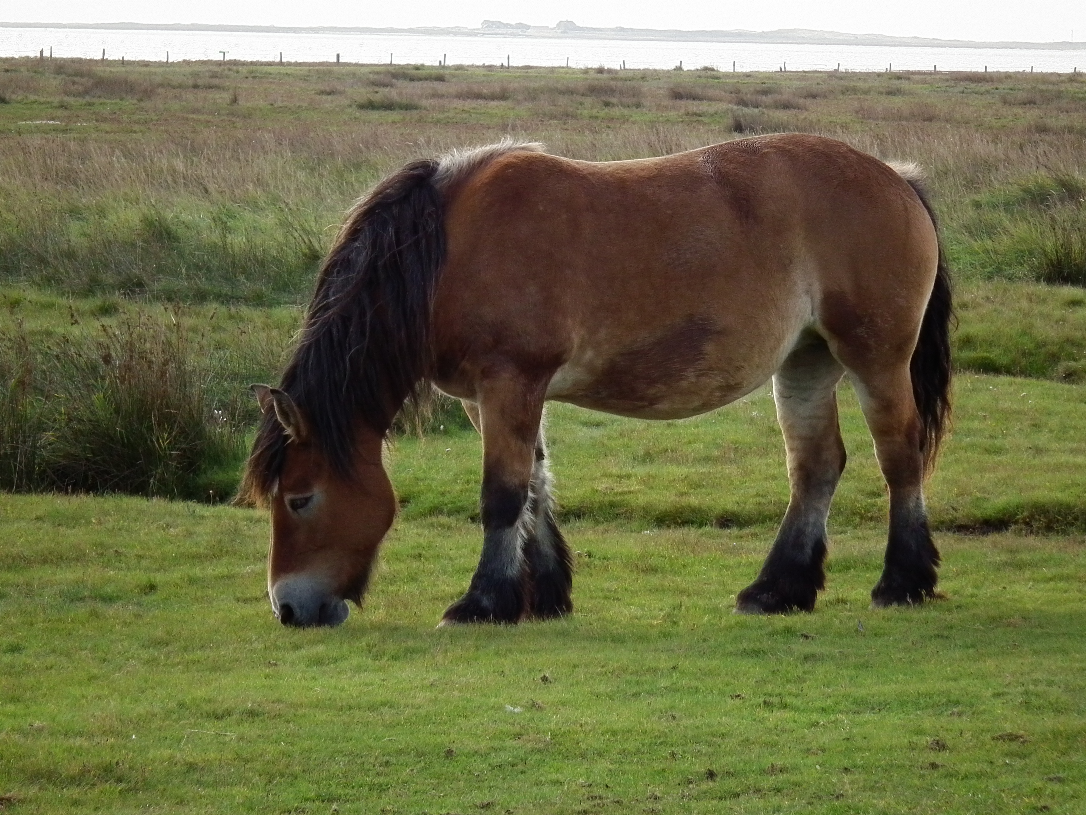 Grasender Kaltblüter auf der ostfriesischen Nordseeinsel Juist (Niedersachsen, Deutschland)